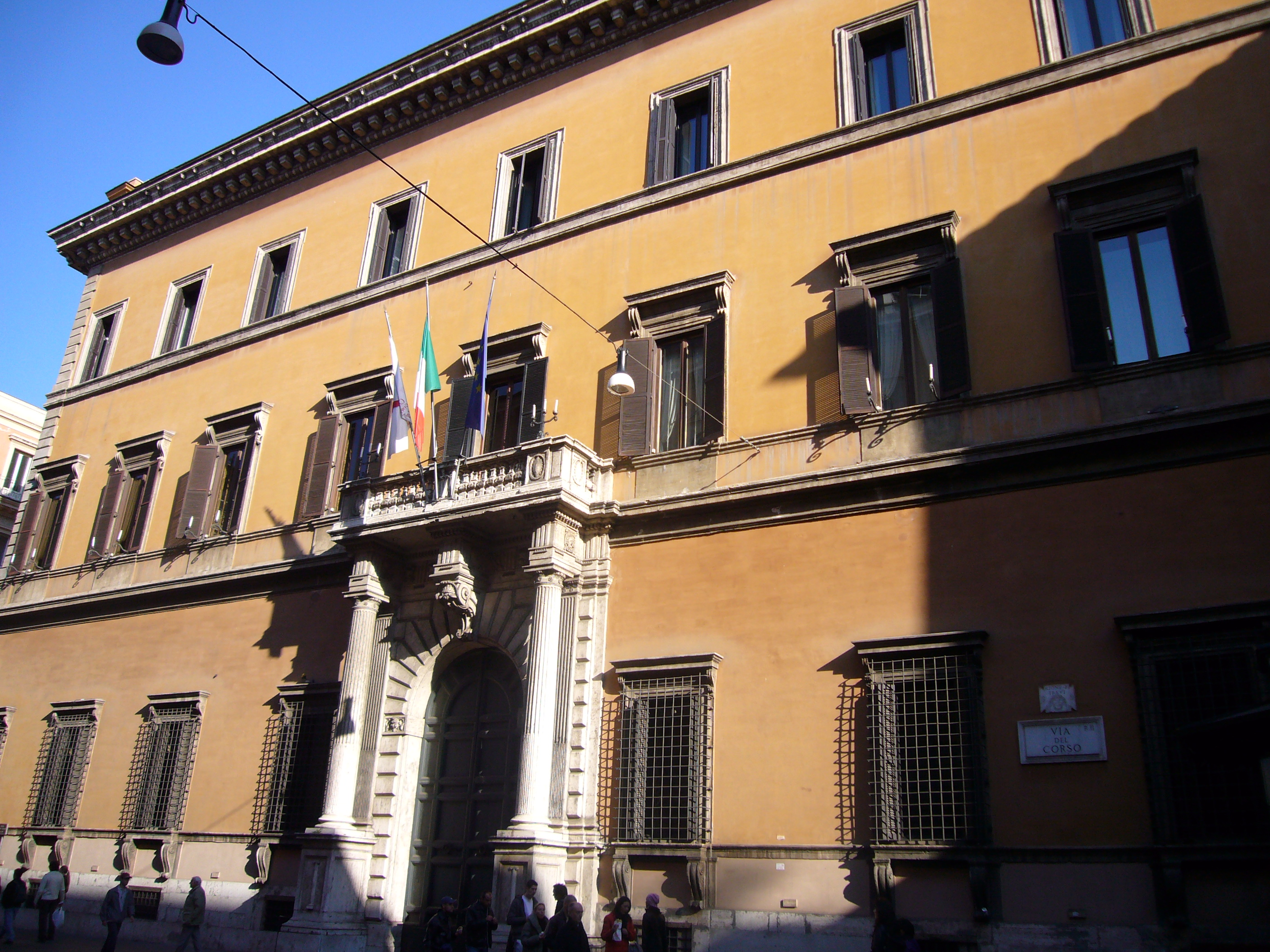 Roma, palazzo Sciarra Colonna a via del Corso (Facciata di Flaminio Ponzio)